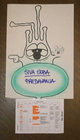 Bočko na vratima Sive sobe na SFeraKonu u Zagrebu